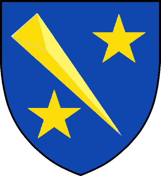 Vapensköld för svenska adelsätten Kijl nummer 1455